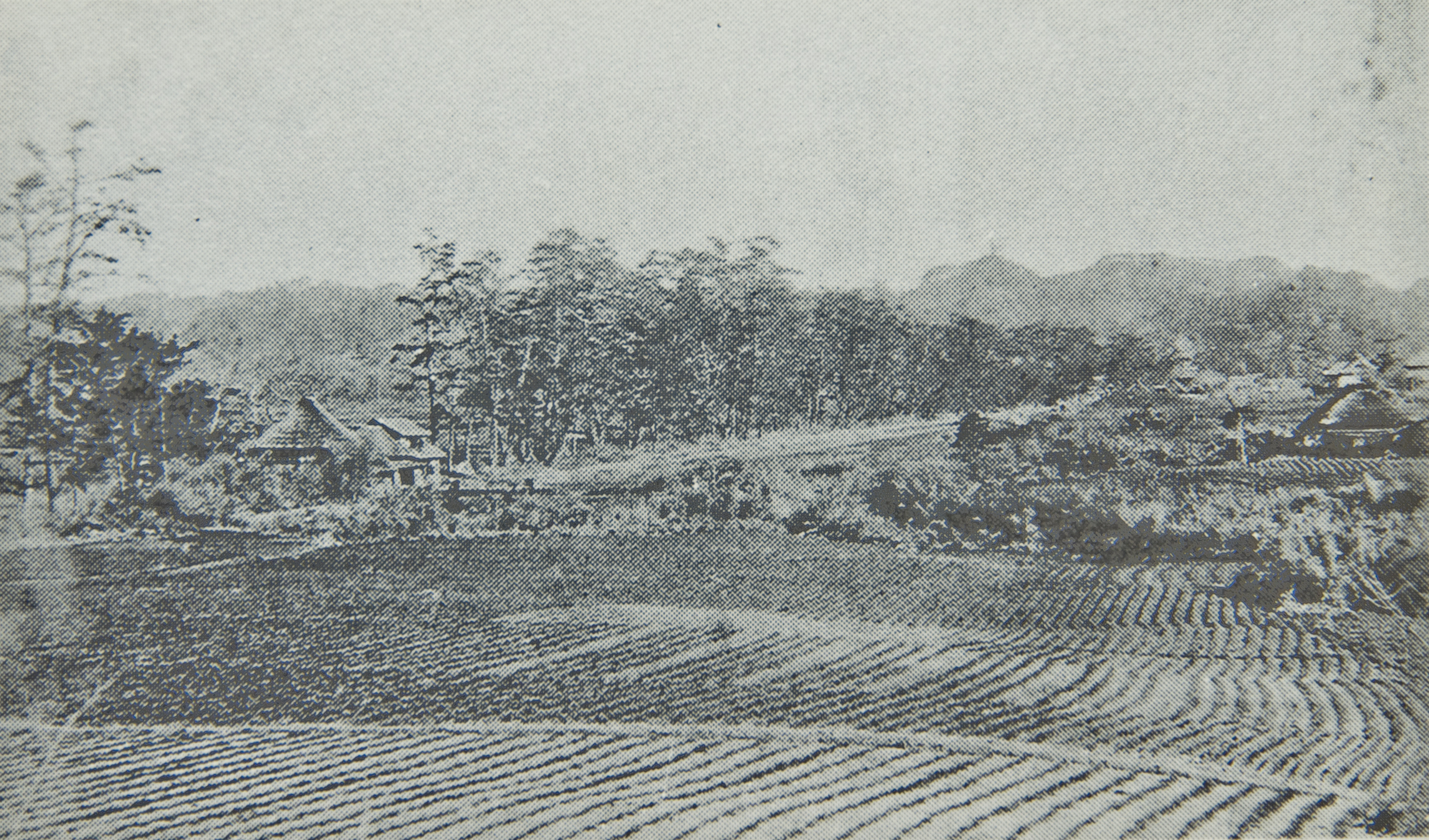 Kamakura, Wakamiya Ōji in 1868 (Meiji 20)